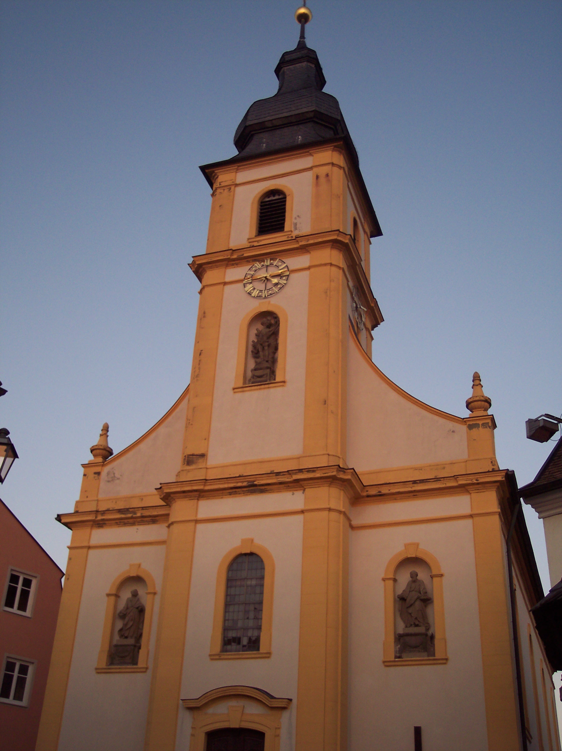 Kirche Sankt Sebastian in Unterspiesheim